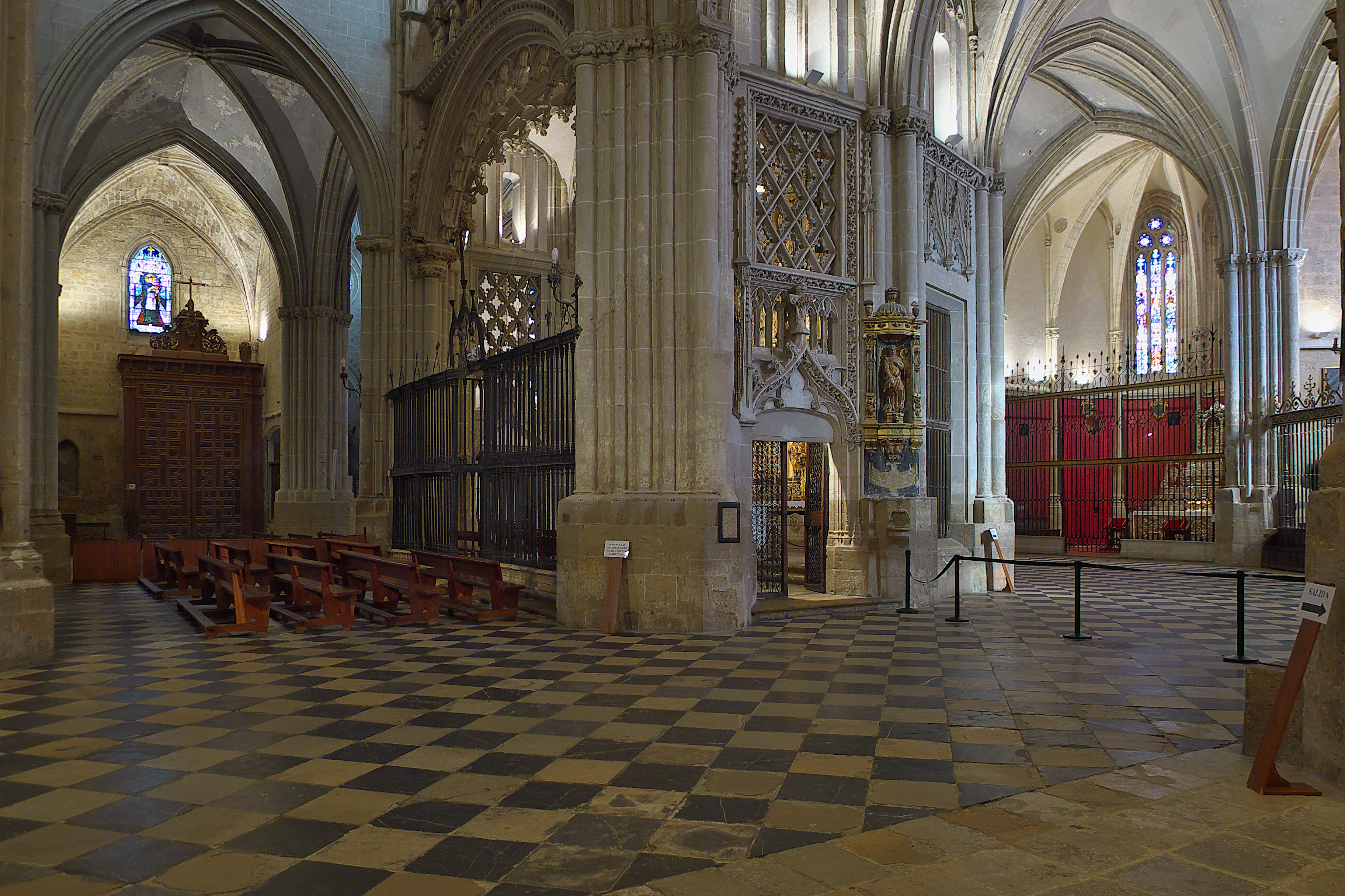 Cabecera de la catedral. Antigua capilla mayor de la fábrica gótica trazada en 1321, siguiendo el modelo de Reims o Bayona. La Capilla del Sagrario, constituye una innovación en la arquitectura gótica española de principios del XV (1424-1437) que aporta a la actual catedral un espacio de belleza y armonía indiscutible. Logro de su maestro mayor, el flamenco Isabrante, o Isambart, Hisambret, Ysambart, Ysambert, Isambret o Jehan Ysambarte, con el patrocinio del obispo Sancho de Rojas y el supuesto de destinarla a su capilla funeraria.